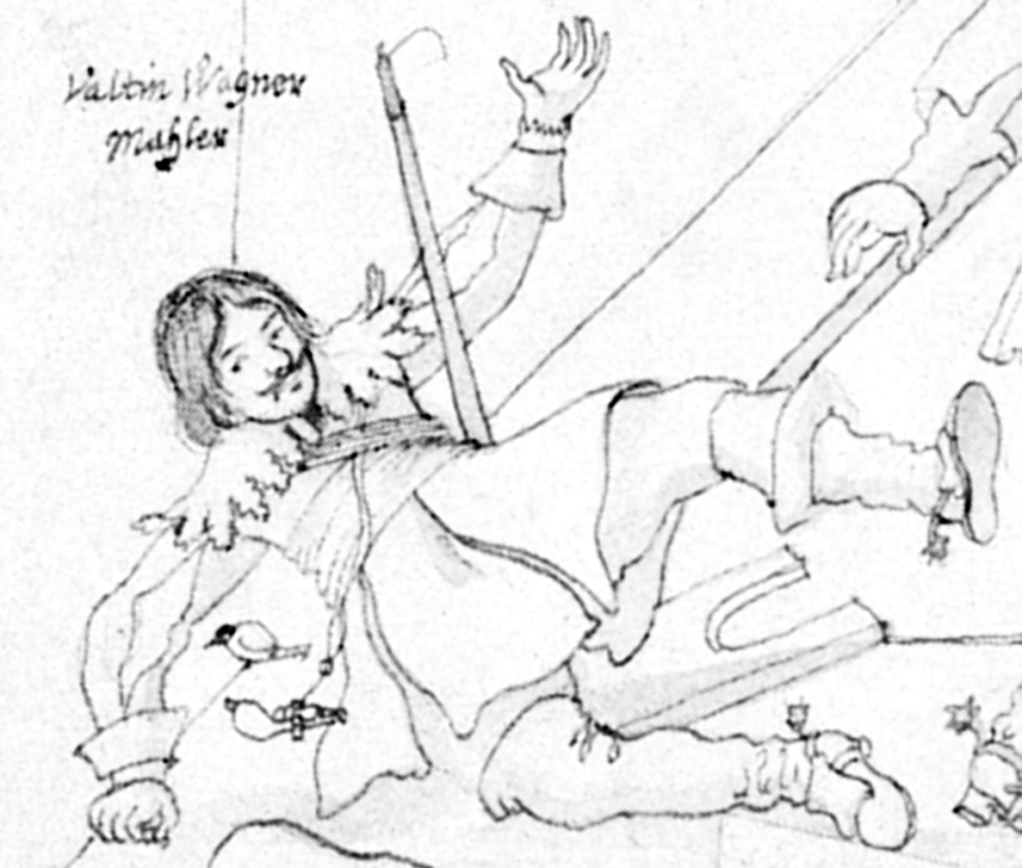 Valentin Wagner, Selbstportrait (Detail).